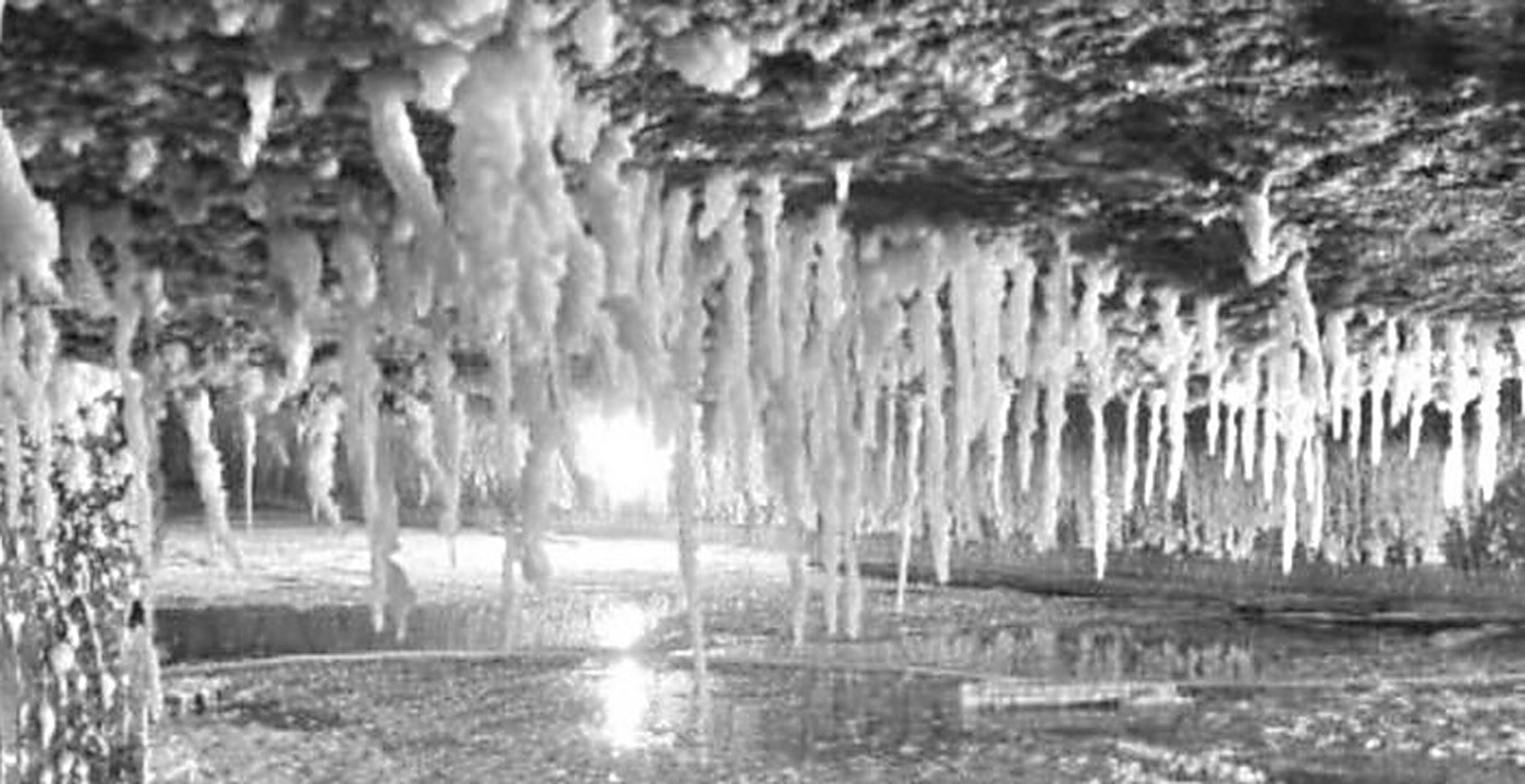 Stalactice de sare în mina Ghizela de la Salina Turda, judeţ Cluj, Romȃnia